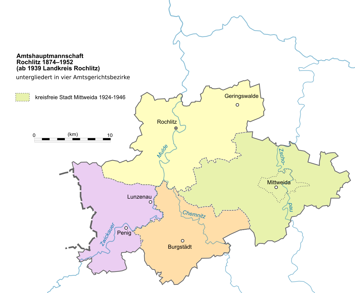 Amtshauptmannschaft Rochlitz 1874-1952, plus Amtsgerichtsbezirke